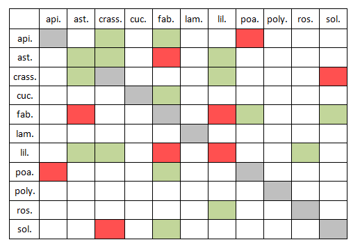 Növénytársítási táblázat növénycsaládok szerint